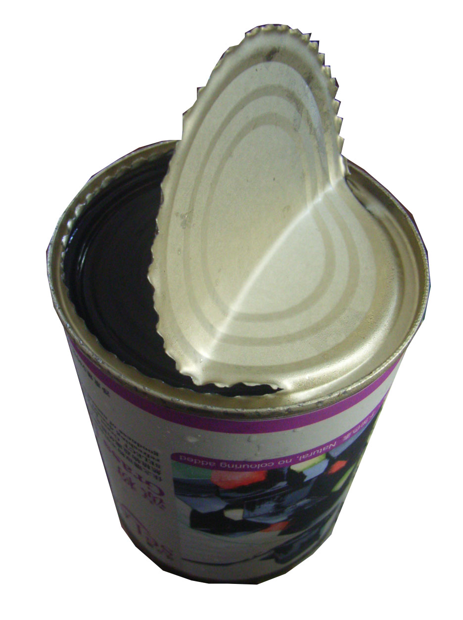 馬口鐵罐頭食品zh:涼粉